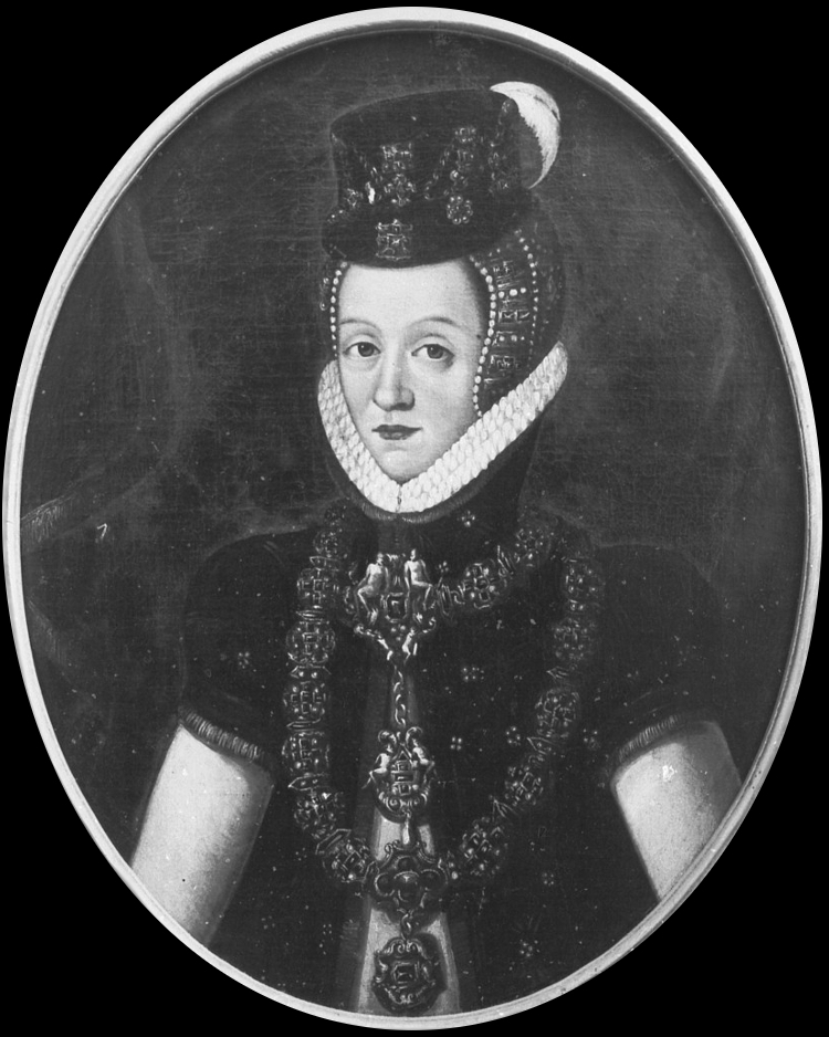 Christine de Hesse, épouse d'Adolf de Holstein Gottorp